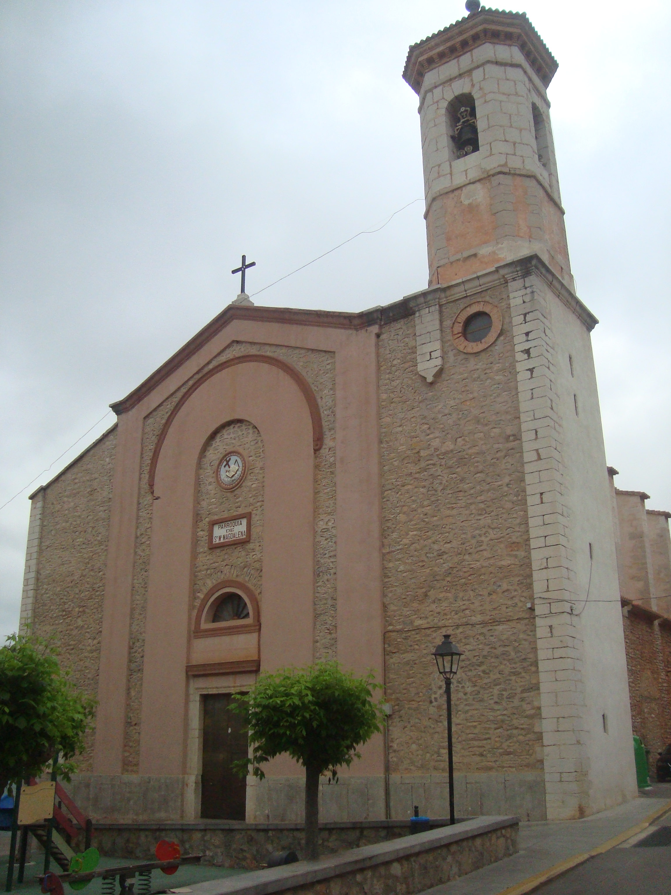 Església parroquial de Santa Magdalena (Santa Magdalena de Polpís) 03.102-002.